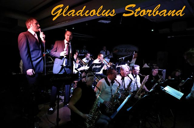 Gladiolus Storband i aksjon ved Kulturpuben Vårt Hjem i Steinkjer